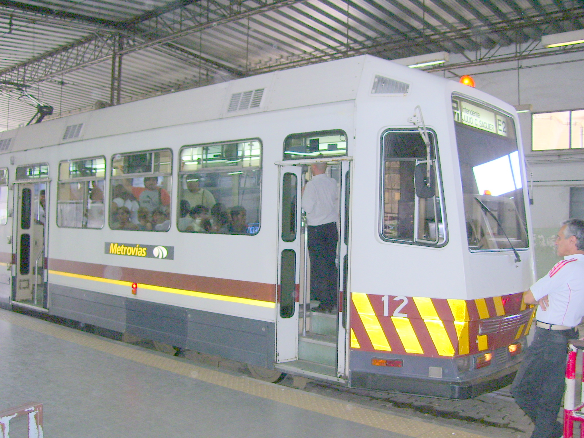 Foto del Premetro, Estación Int. Saguier. Aquí se hace el trasbordo desde el subte o metro, hacia el Premetro. Buenos Aires, Argentina. 2006